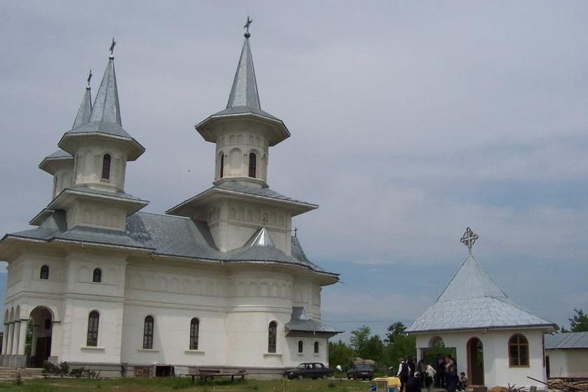 Biserica Sfântul Nicolae, Lieşti, Galaţi, România